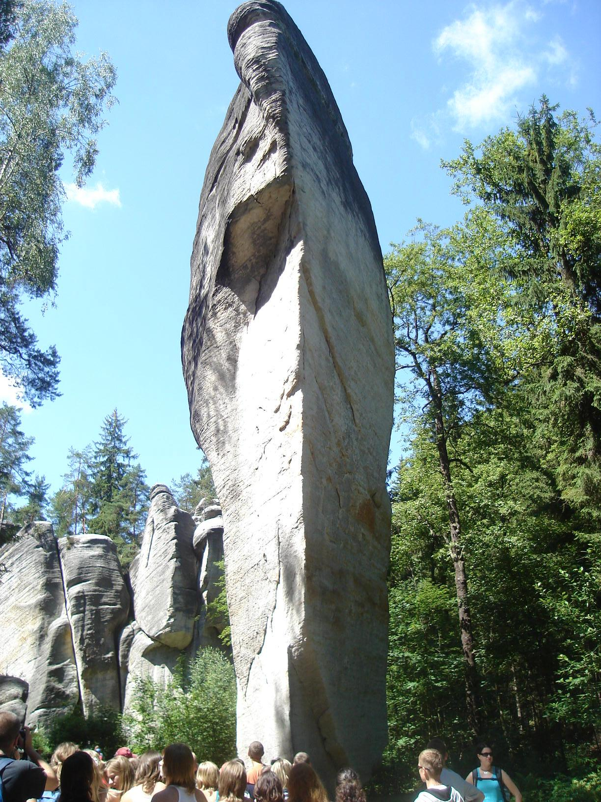 Popularny "śledź" nazwany tak ze względu na swój kształt.